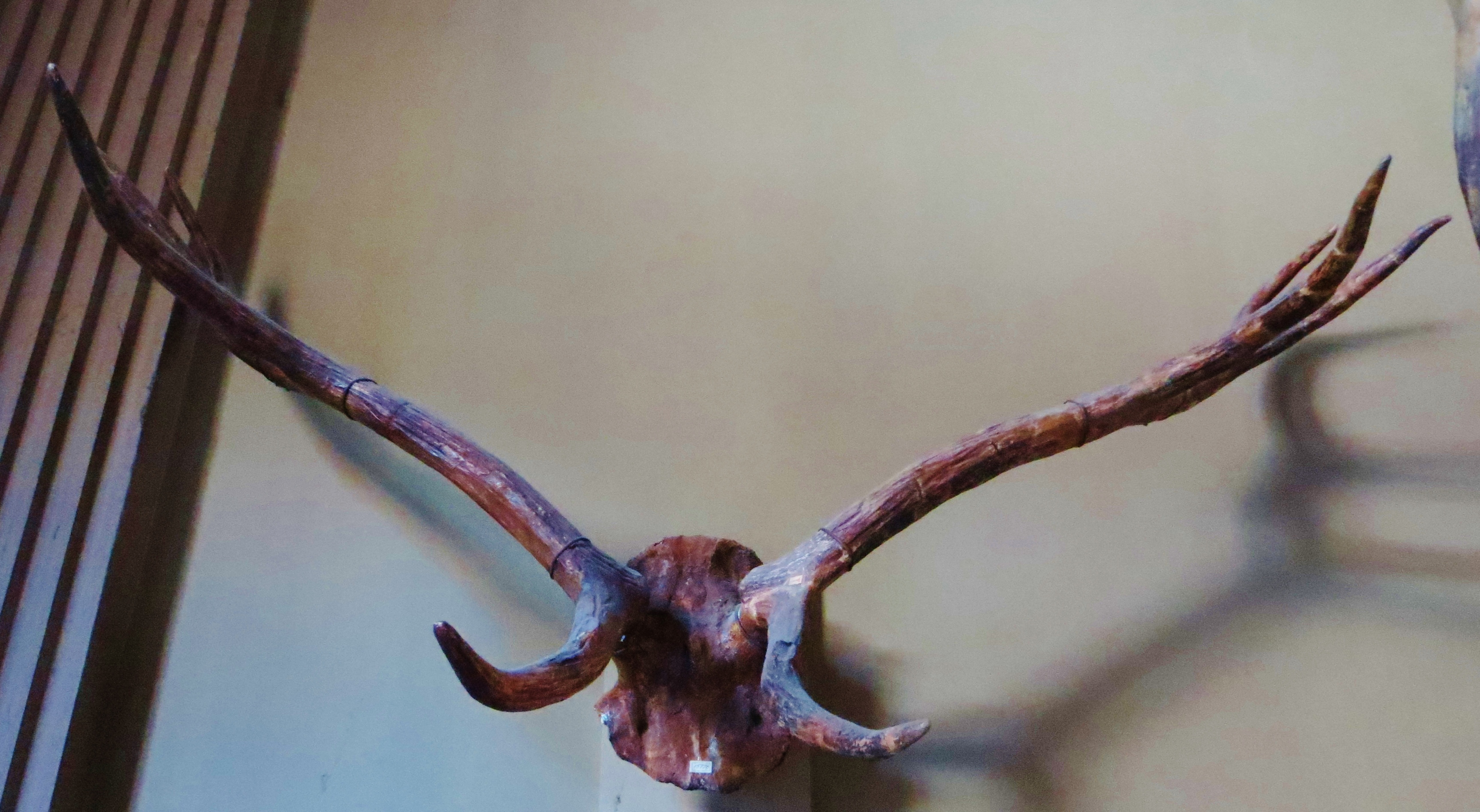 Fossil of Eucladoceros, an extinct mammal- Took the picture at Teylers Museum, Haarlem